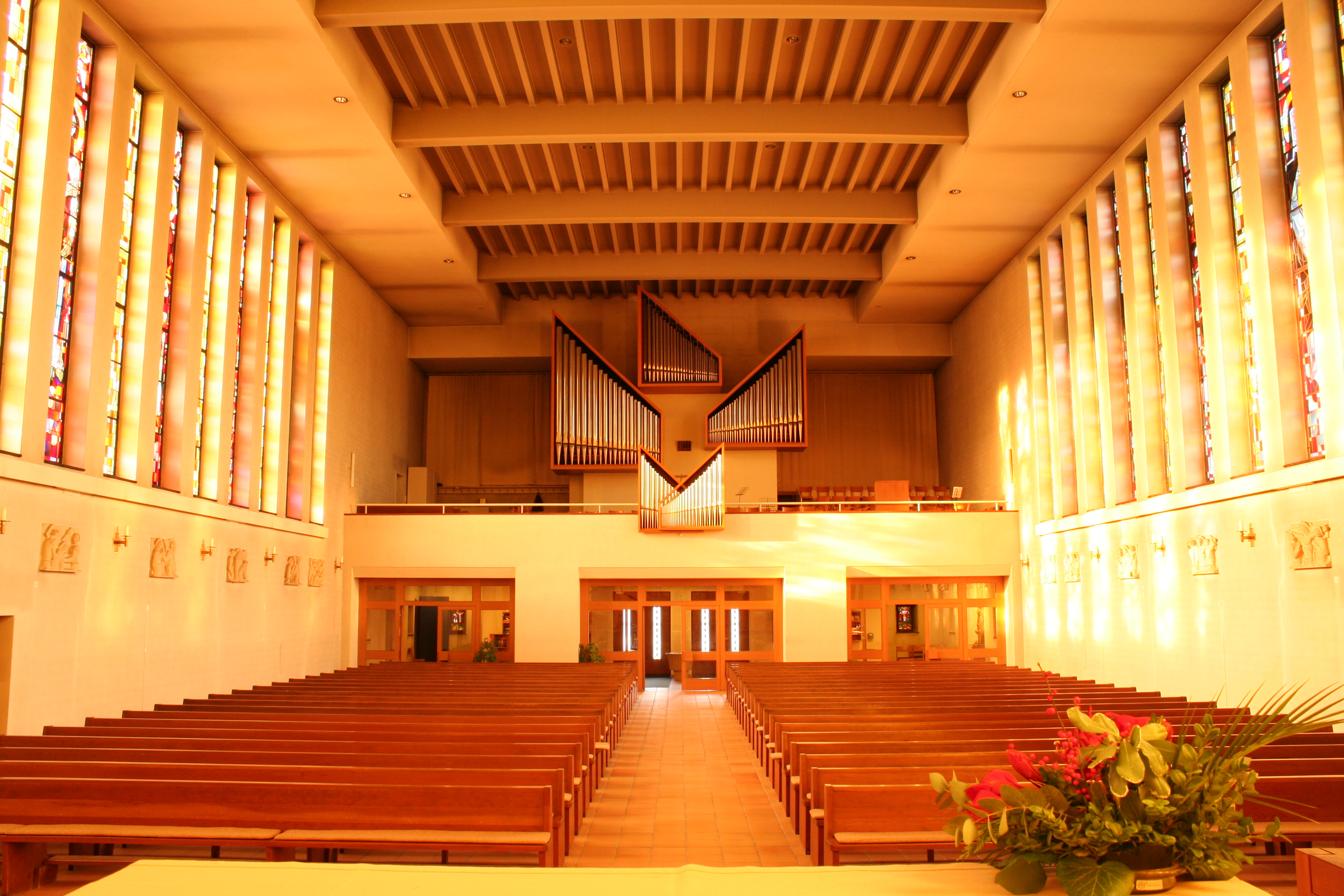 Römisch-katholische Pfarrkirche Herz Jesu Winterthur-Mattenbach